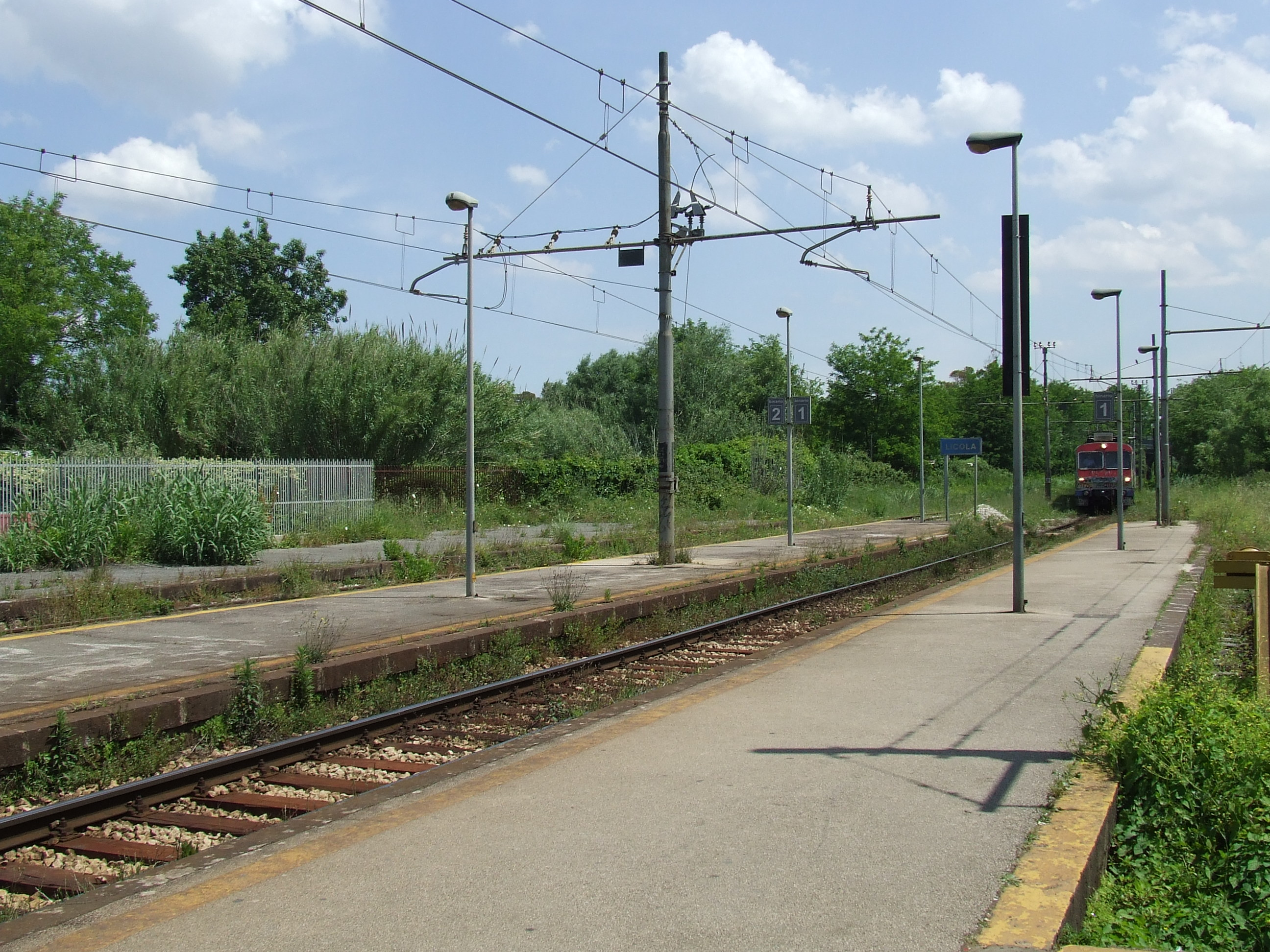 Stazione di Licola, linea Circumflegrea, EAV - area banchine e treno in arrivo